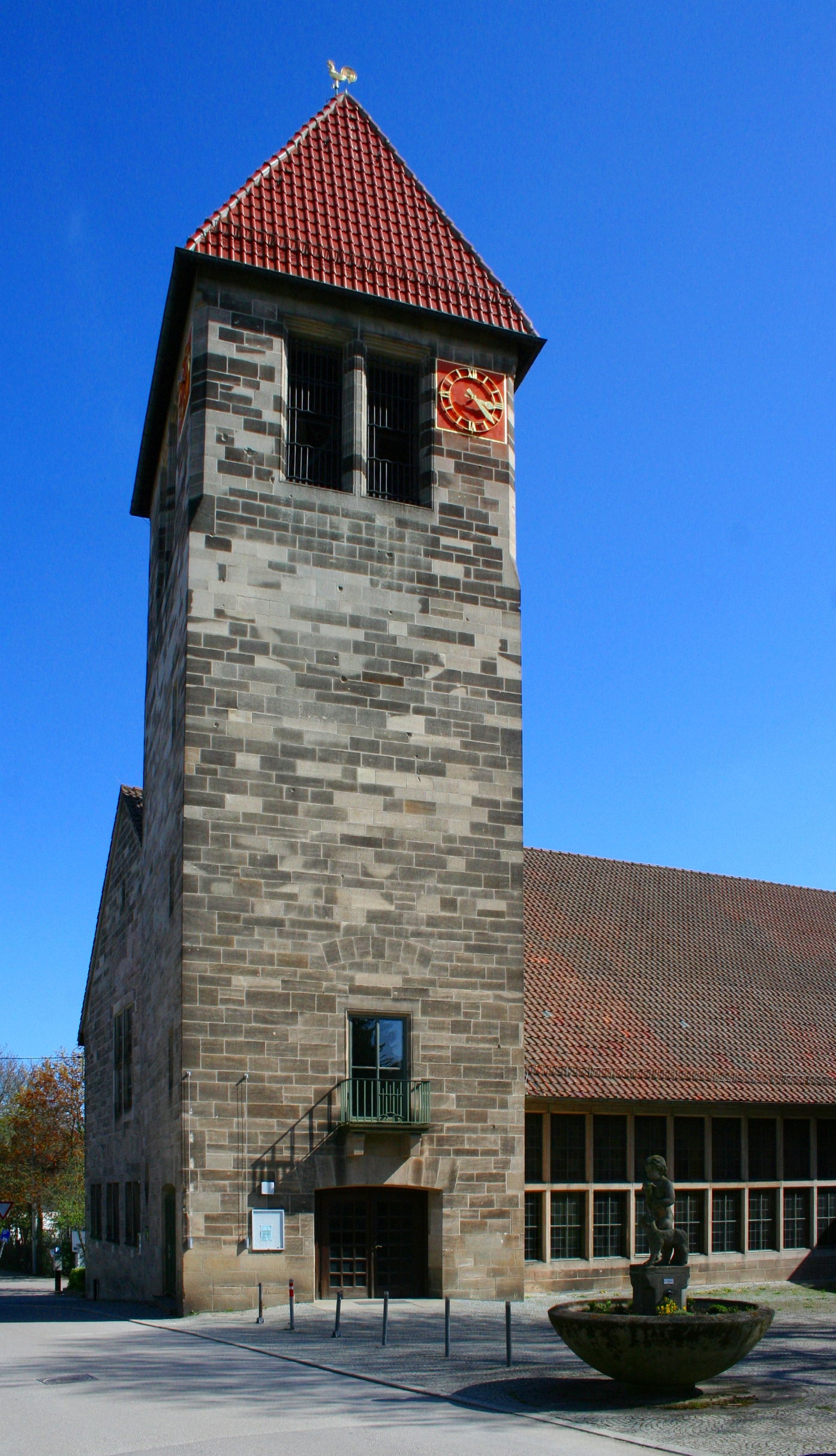 Martinskirche am Pragfriedhof in Stuttgart-Nord